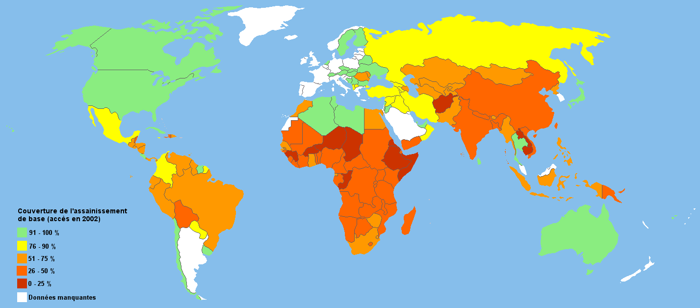 Sanitation coverage - couverture de l'assainissement de base